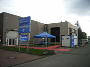 Hessenquizdrehort im Gewerbegebiet von Steinbach